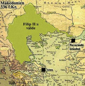 Egentillverkad karta av Makedonien under Filip II